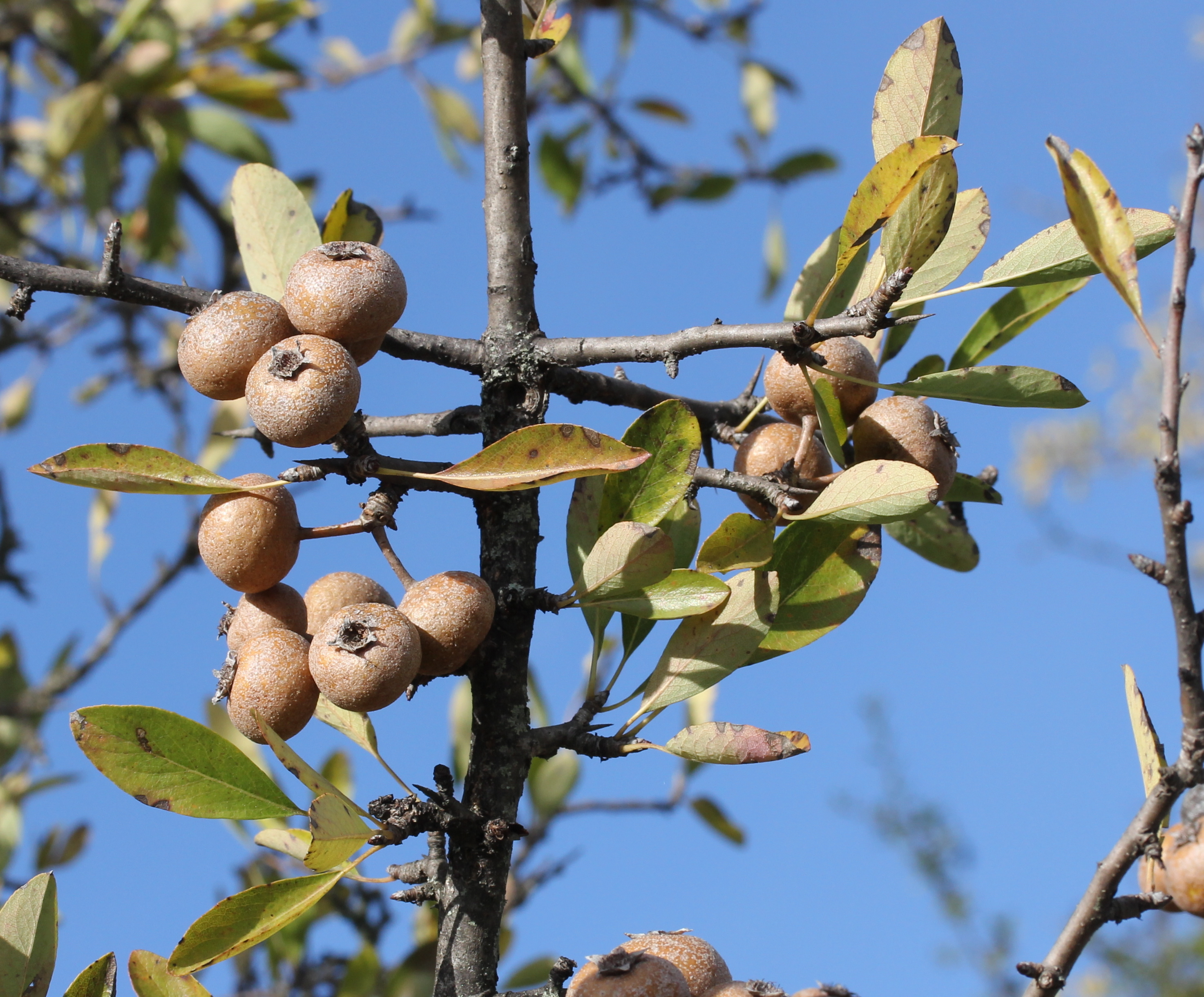 Pyrus spinosa (branche comportant des fruits)